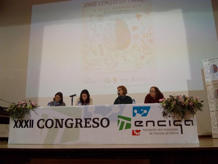 Directiva de Enciga 2019